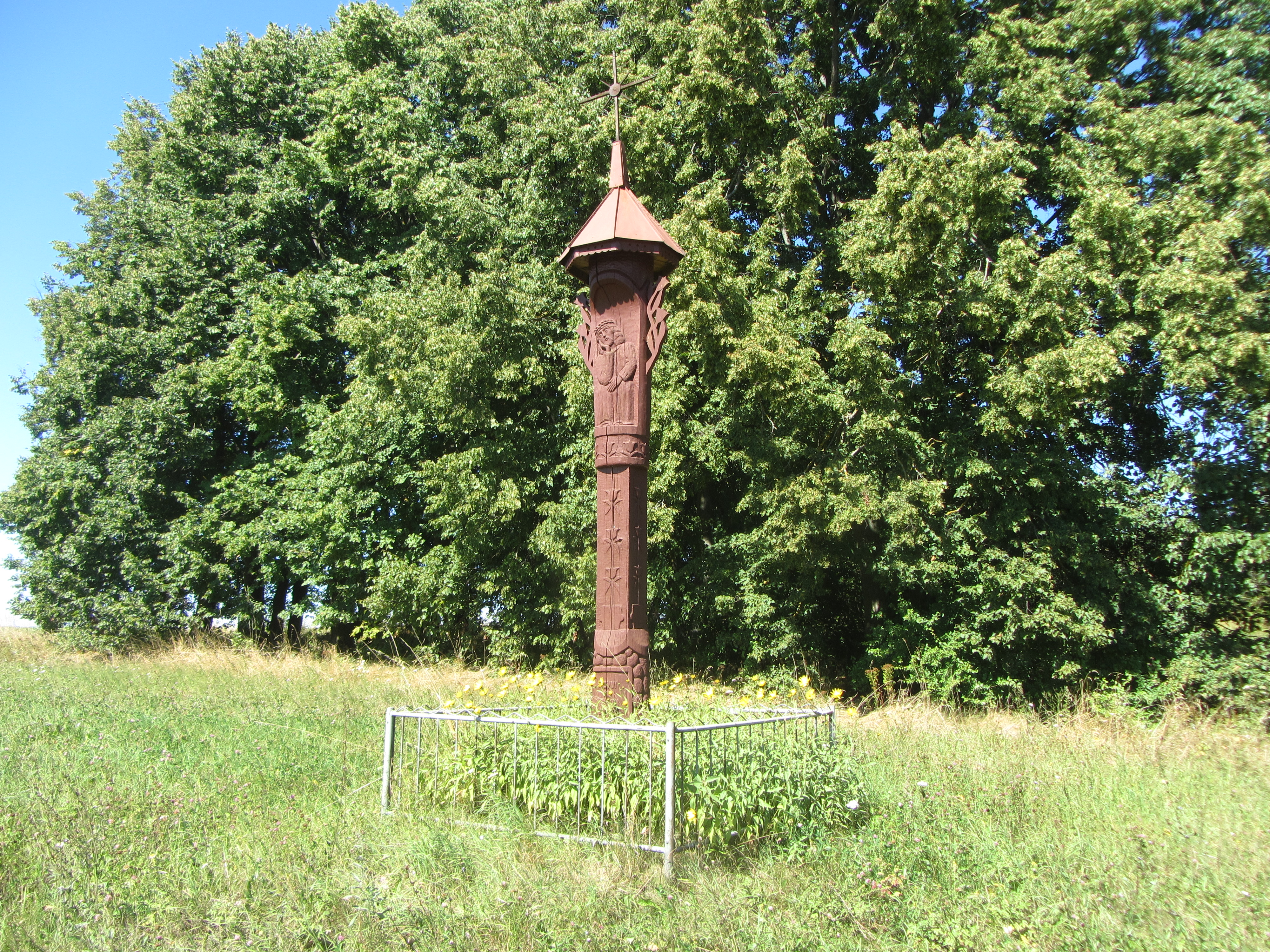 Kupiškio sen., Lithuania